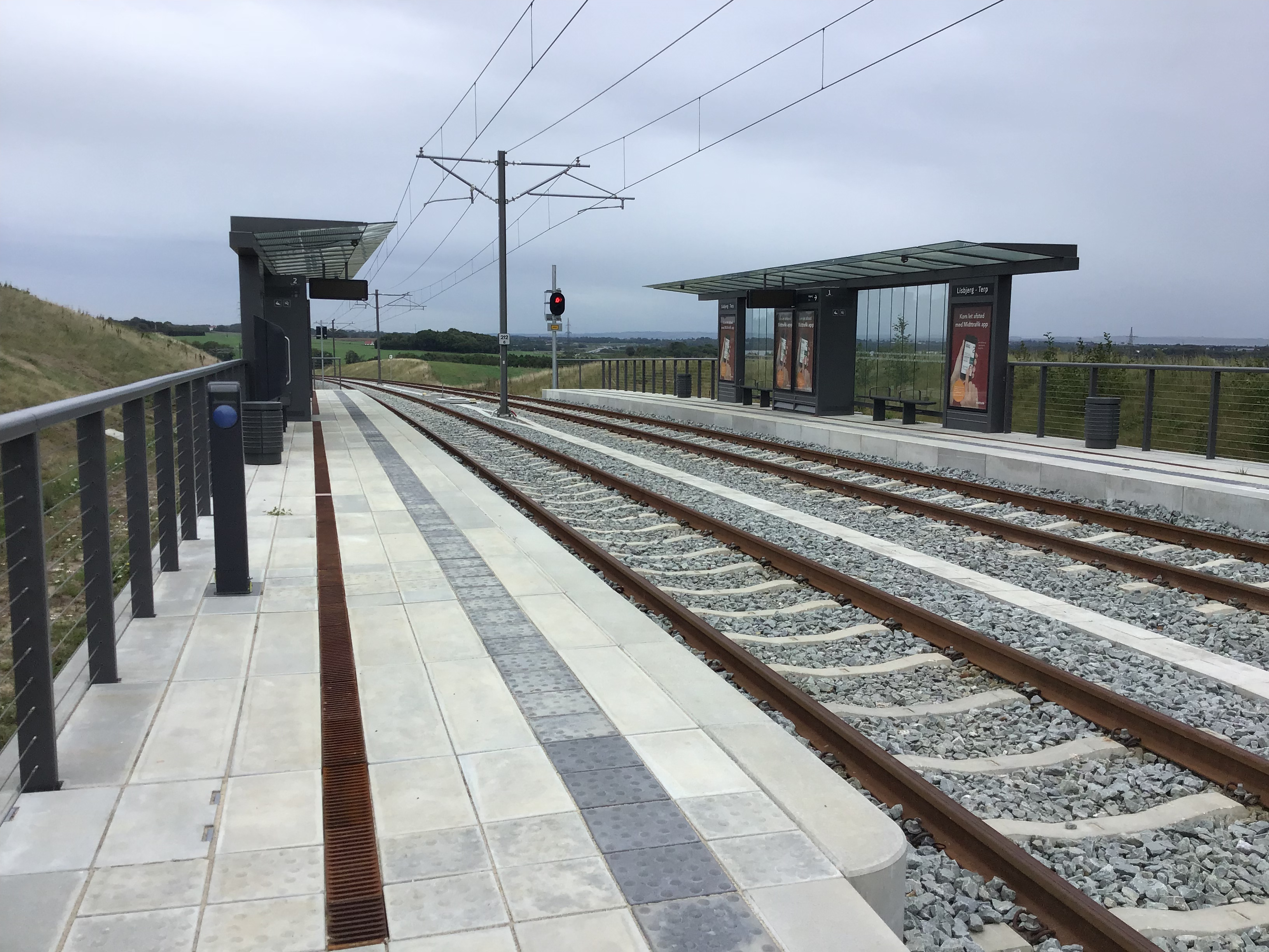 Lisbjerg Terp Station, Århus Letbane